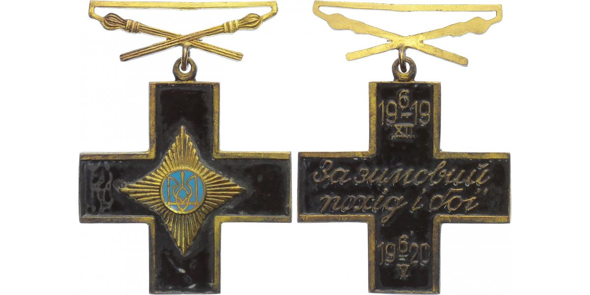 Орден «Железный крест» (Украинская Народная Республика)